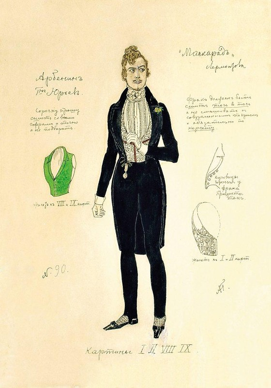 Эскизы к постановке драмы М. Лермонтова «Маскарад»